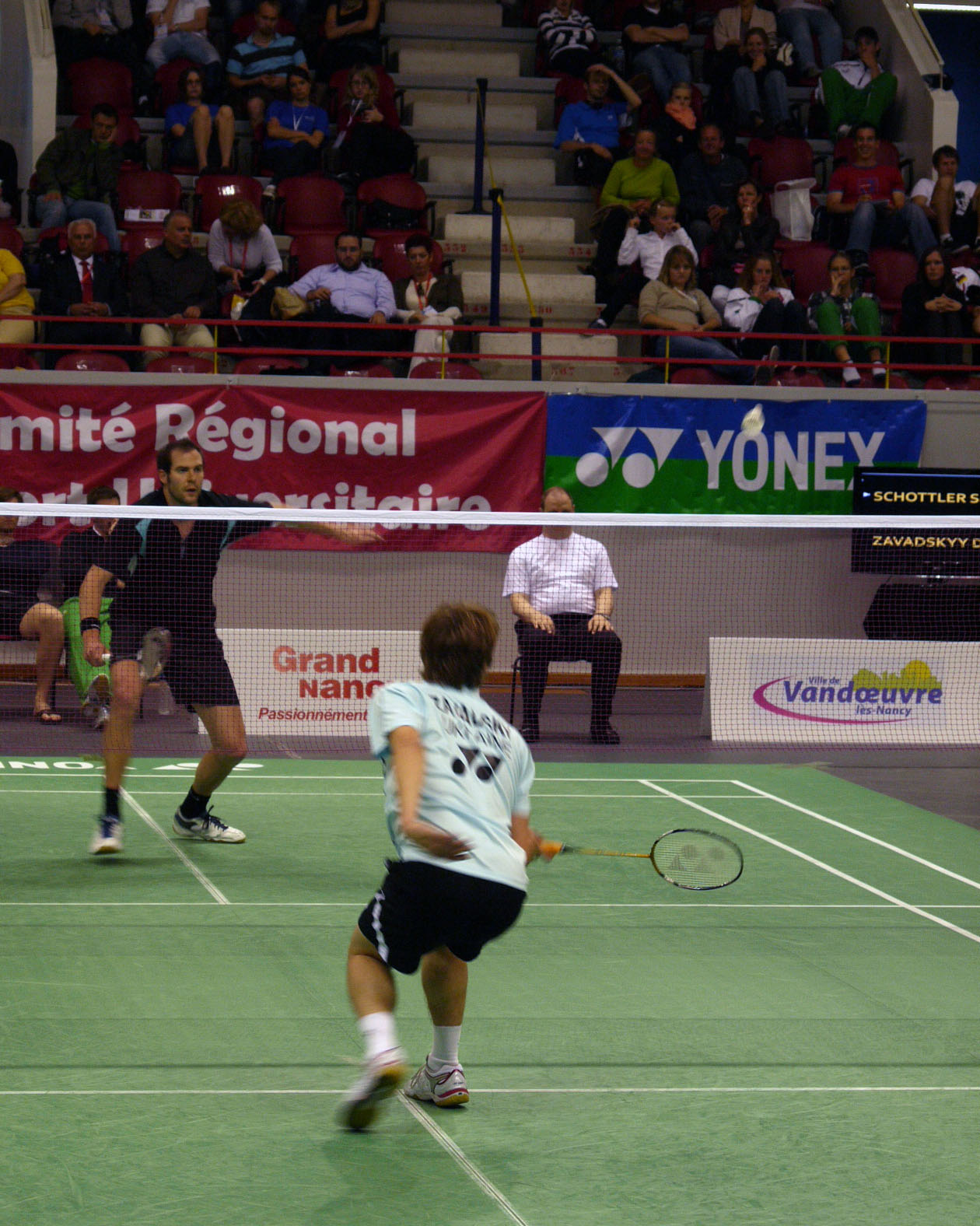 Dmytro Zavadsky and Sebastian Schöttler